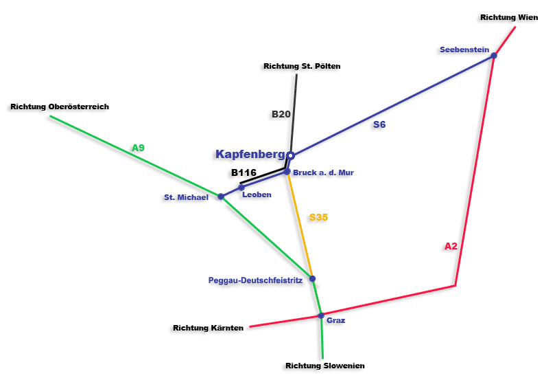 Die Grafik zeigt das Strassen- und Autobahnnetz und deren Anschlüsse um die Stadt Kapfenberg.